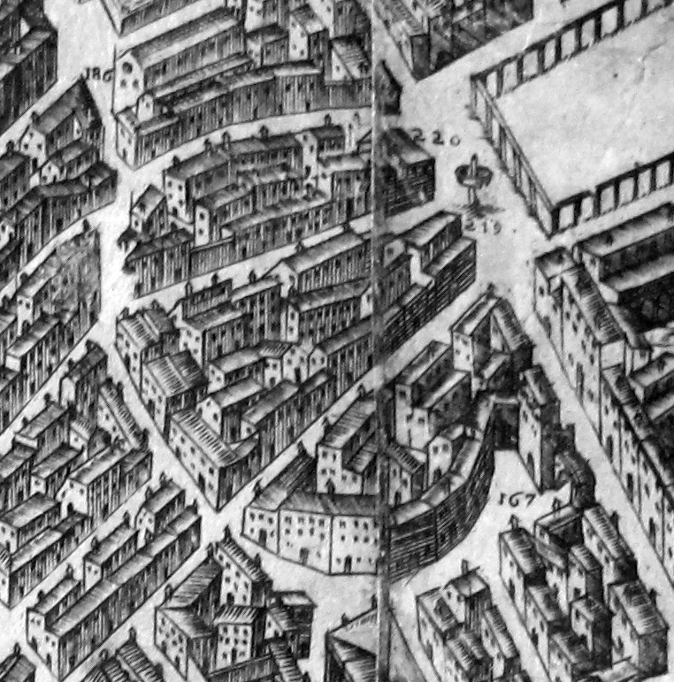 Pianta del buonsignori, dettaglio anfiteatro